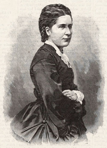 Aurore von Haxthausen (1830-1888)